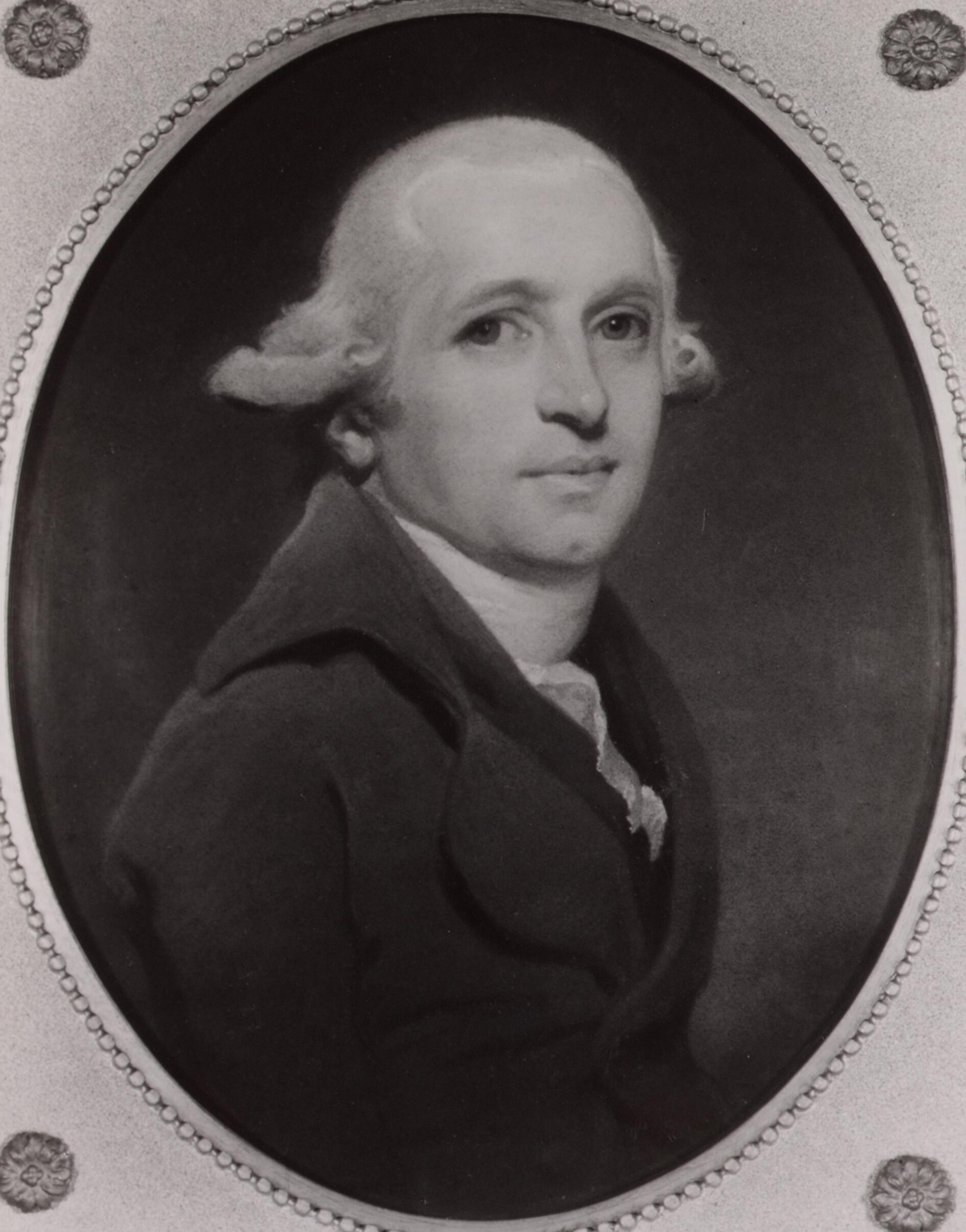 Portret van Paulus van der Heim (1753-1823)